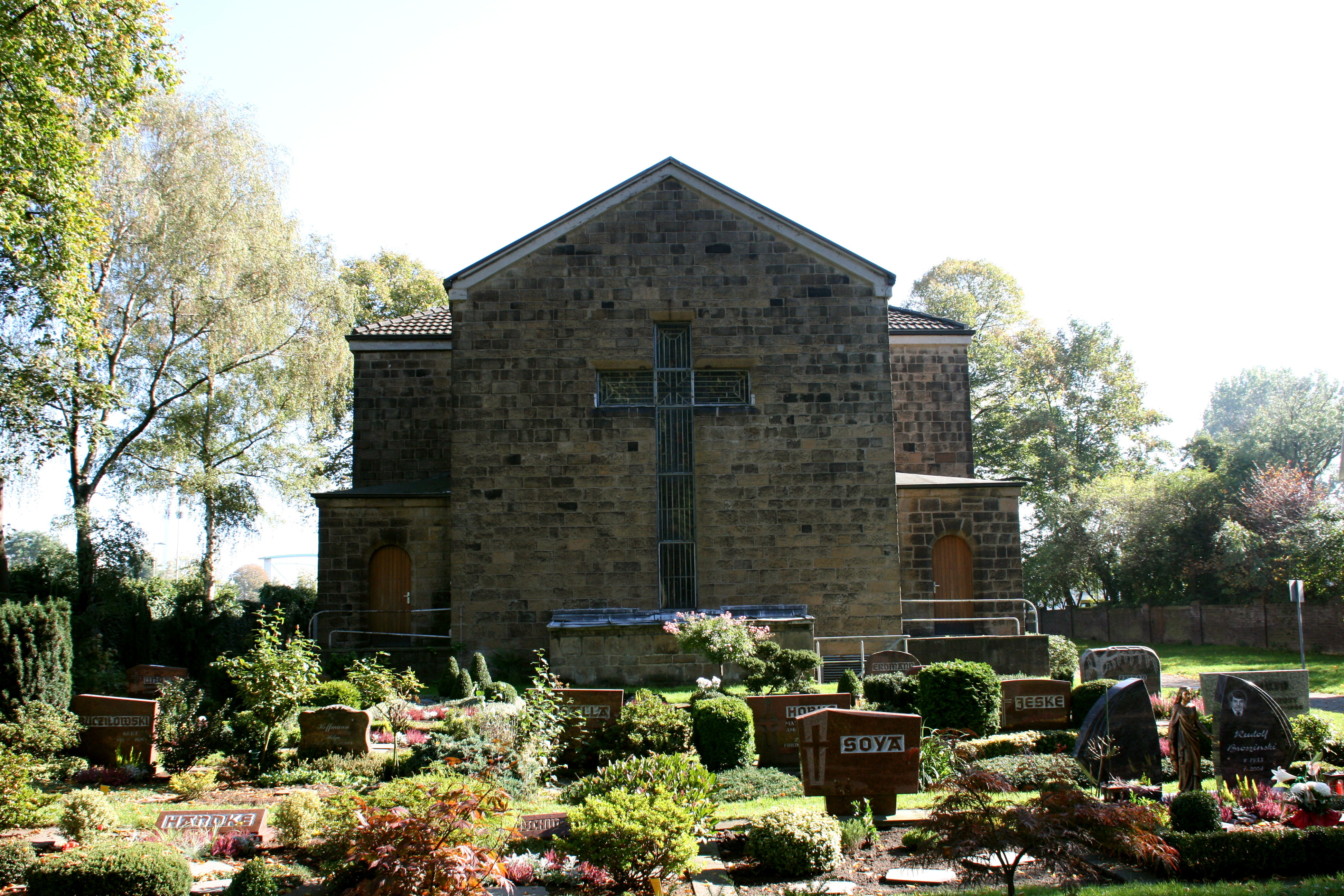 Cranger Kirche, An der Cranger Kirche in Herne-Crange